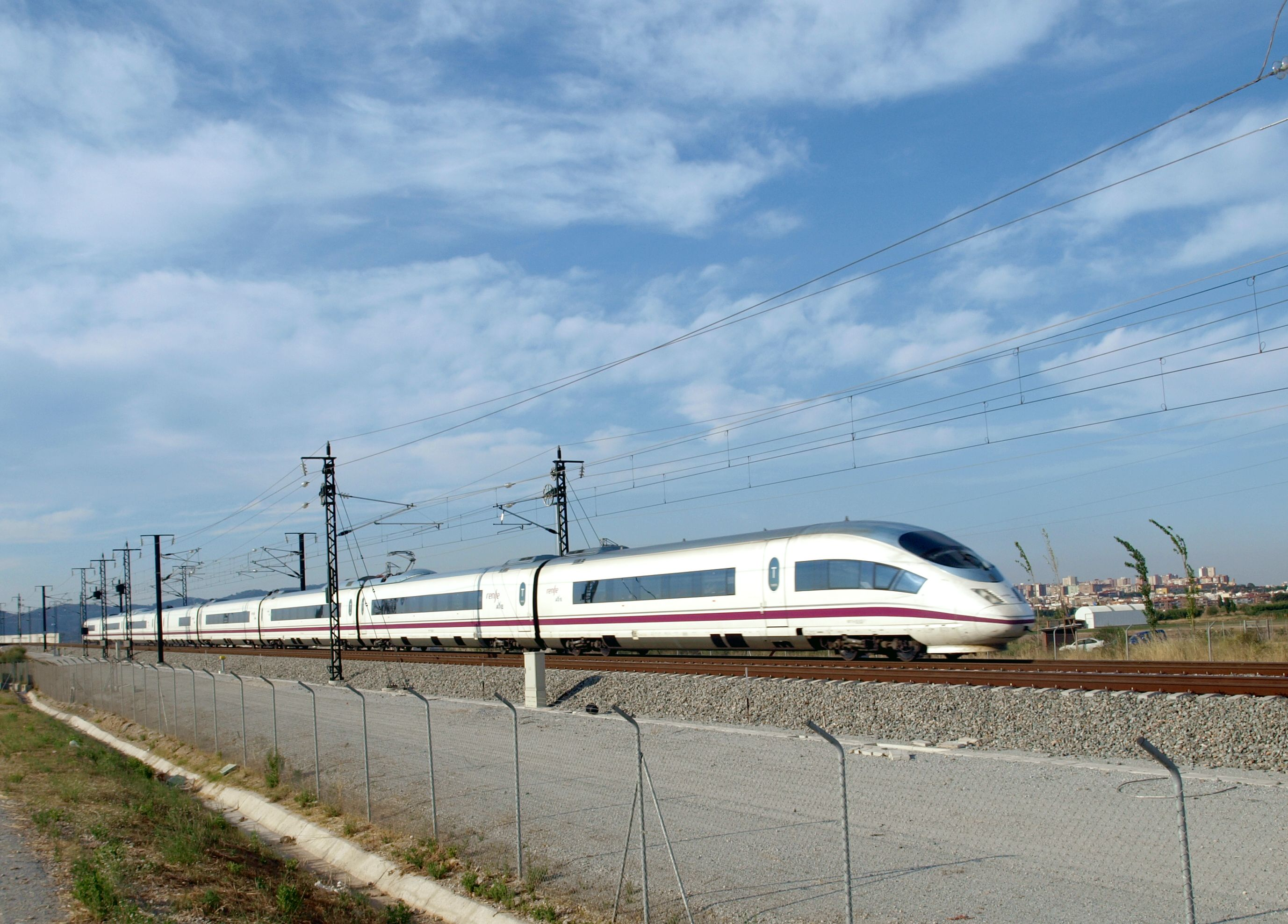 AVE sèrie 103 a poc a poc al acostarse al tunel del Prat.